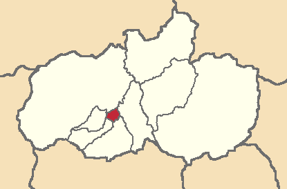 Mapa localizador del cantón en Tungurahua, Ecuador